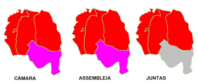 Mapa ilustrativo do partido mais votado por freguesia no Seixal (2017)